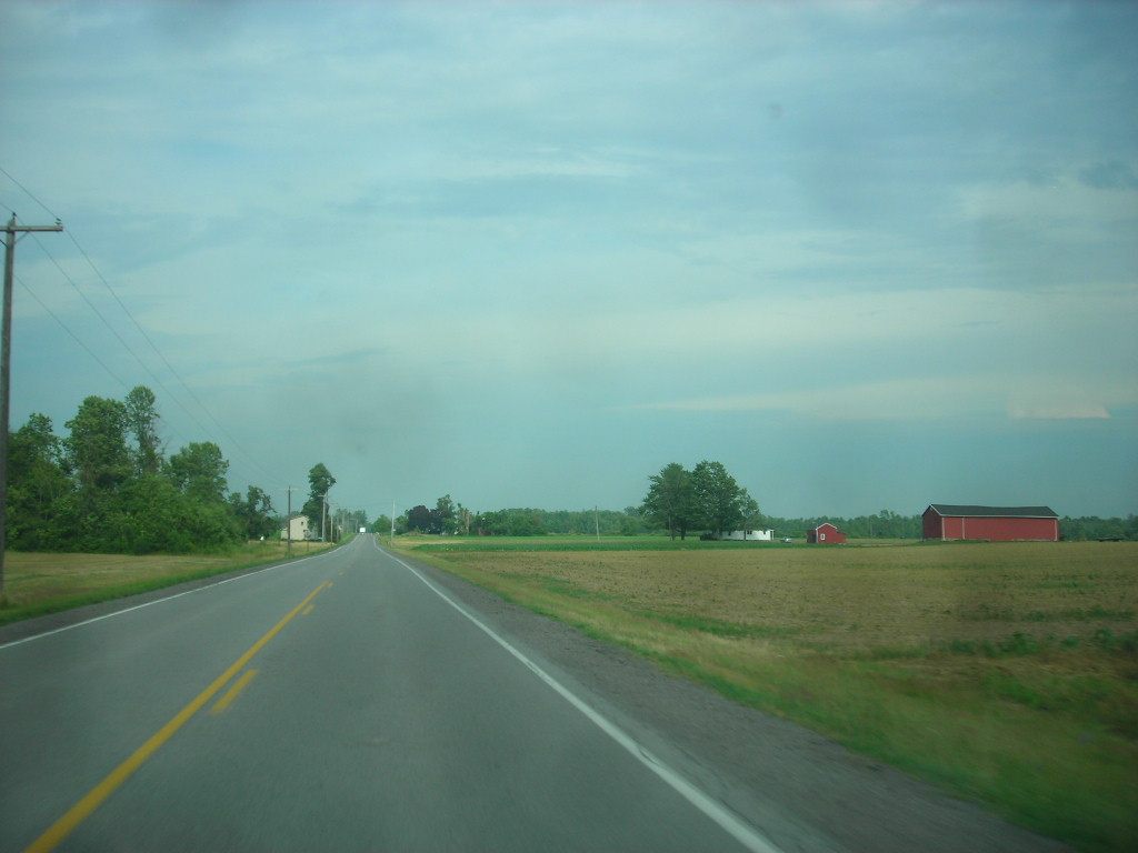 Former NY 267 in Western NY.